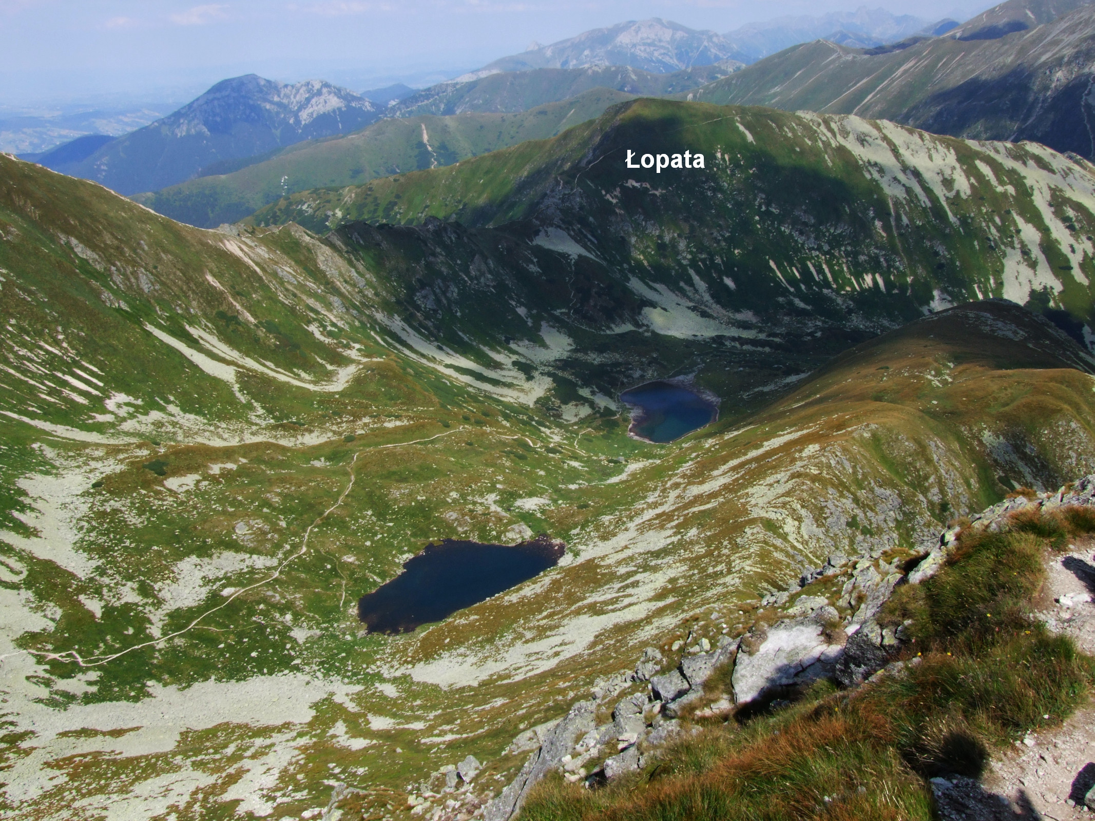 Dziurawa Przełęcz, Łopata, Jamnickie Stawy (Tatry Zachodnie)